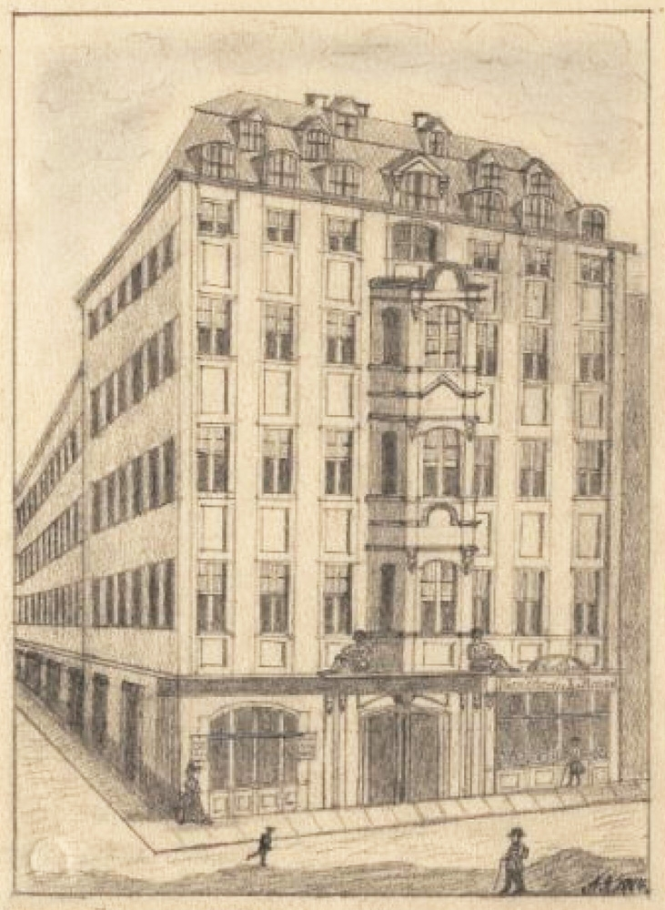 Das jetzige Haus Zum Grönländer in Leipzig, 1884 noch als Haugks Haus